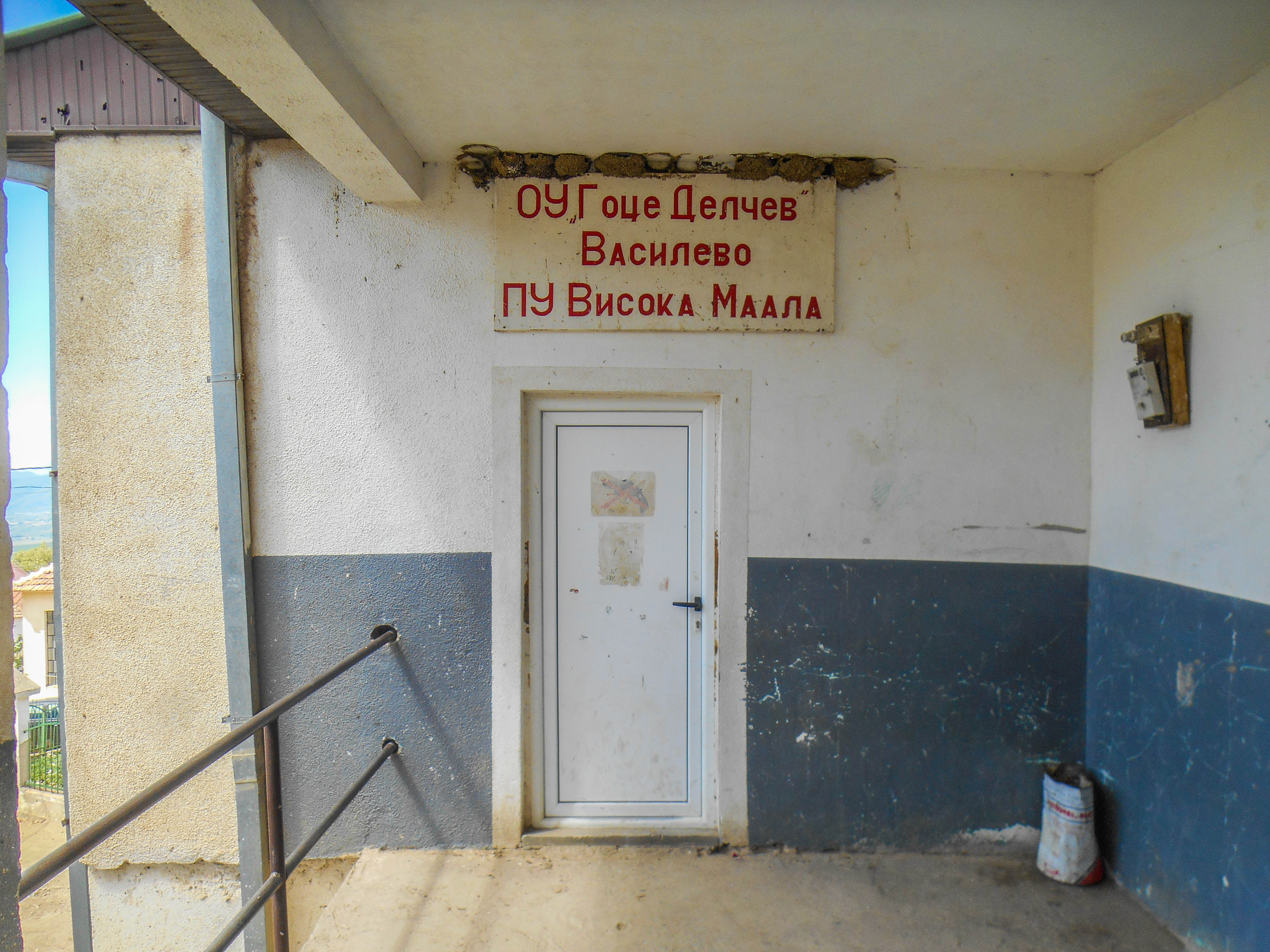 Основно училиште „Атанас Нивичански“ - Висока Маала